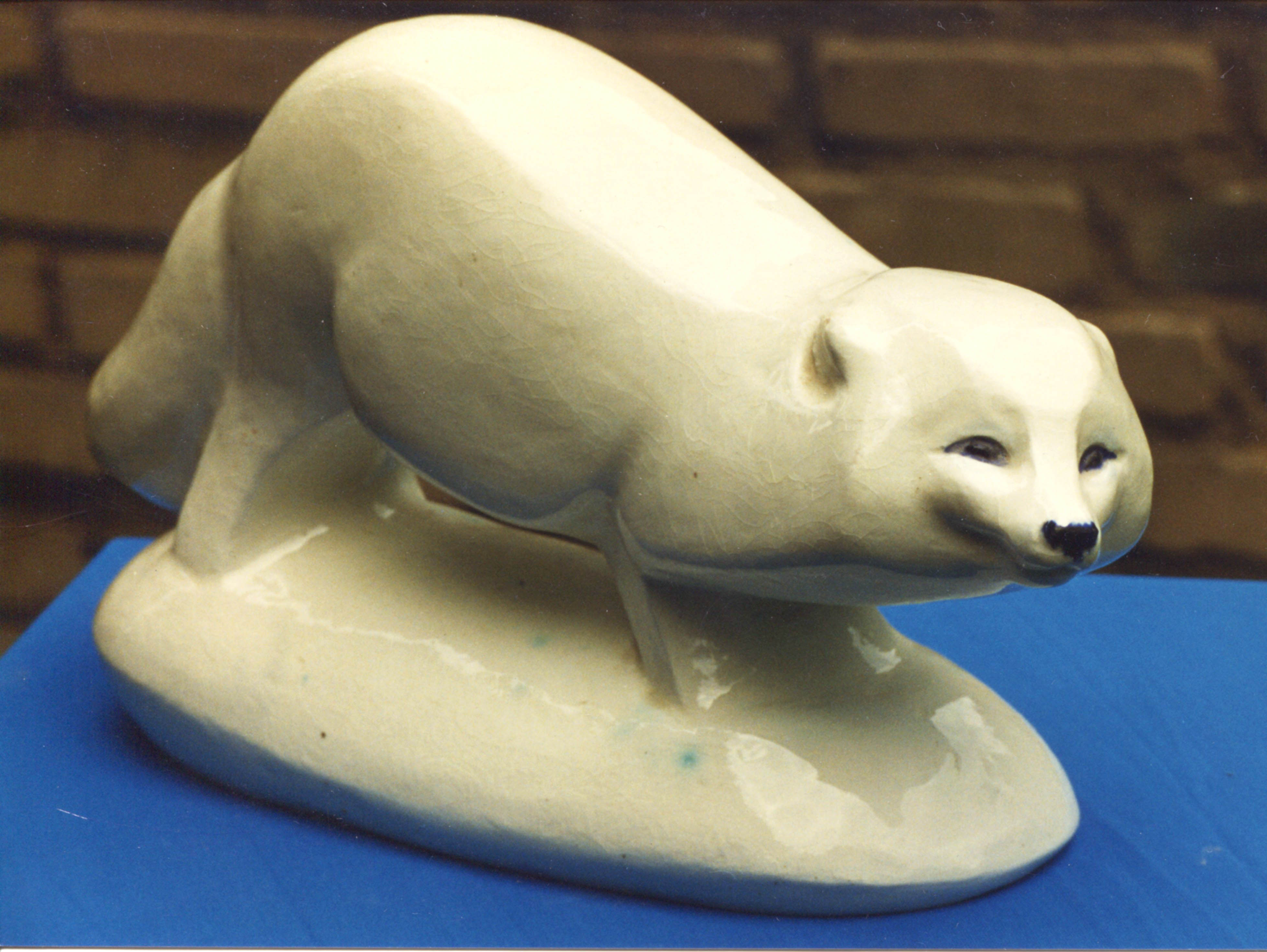 Работа скульптора-художника Николаева Е.В.